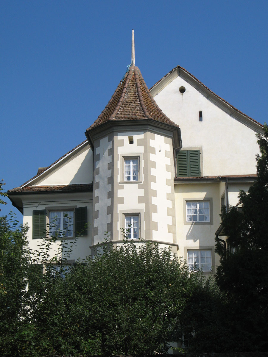 Schlössli in Bremgarten, entstand aus einer mittelalterlichen Burg heraus